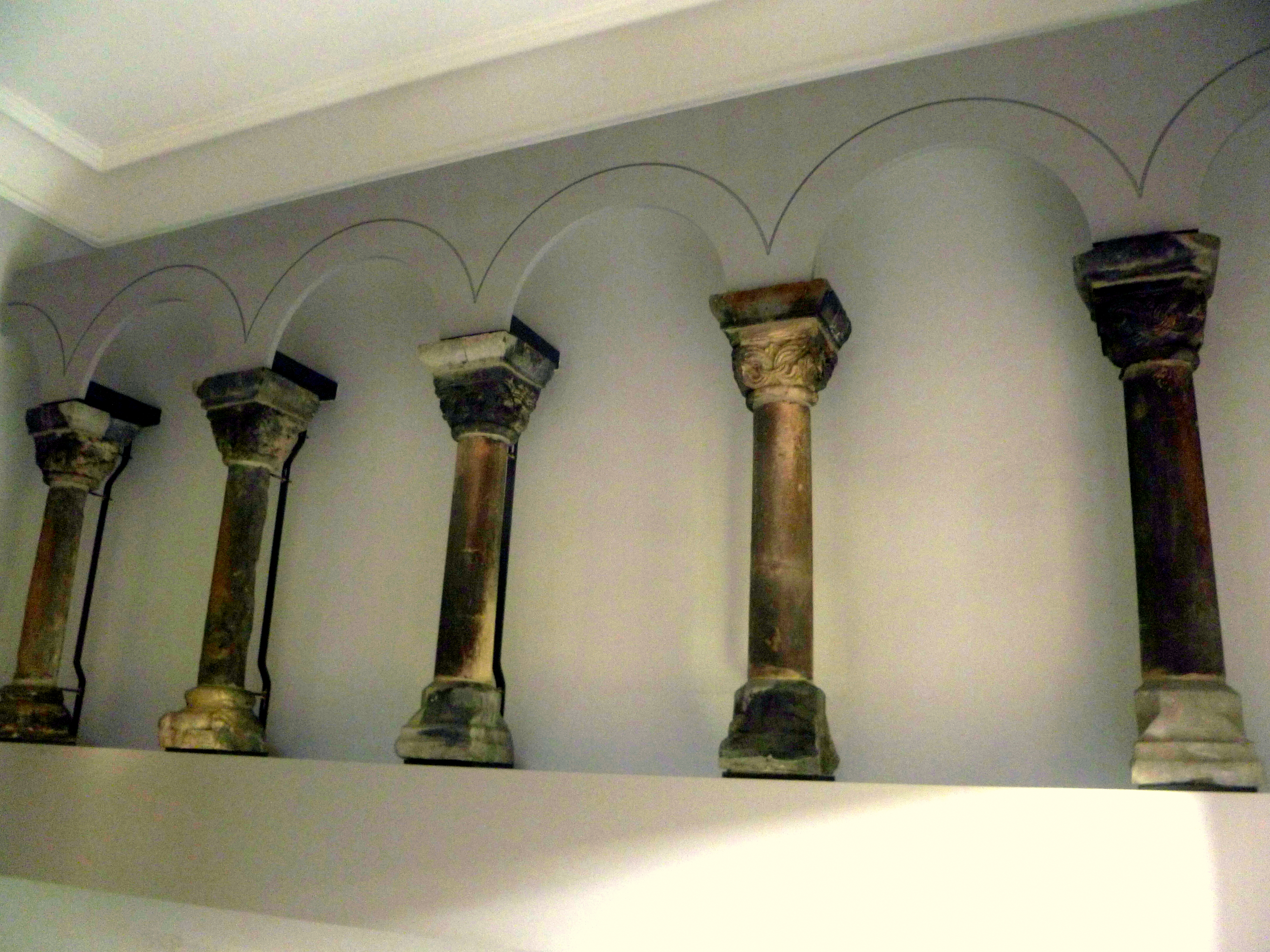 originale romanische Säulen der 1. Abteikirche der Abtei Burtscheid im Bereich der Schatzkammer von St. Johann Aachen-Burtscheid